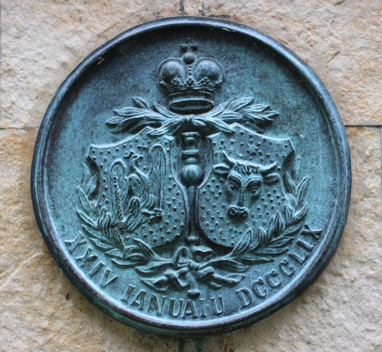 Das ist eine Plakette